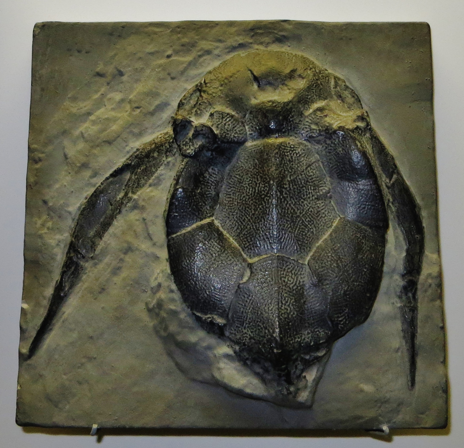 Fossil of Bothriolepis, an extinct fish - Took the picture at Museo di Scienze Naturali di Bergamo